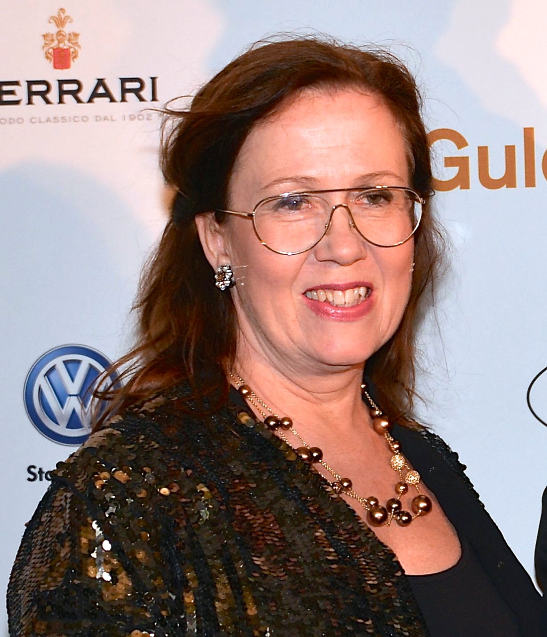 Madeleine Sjöstedt på Guldbaggegalan 21 januari 2013.